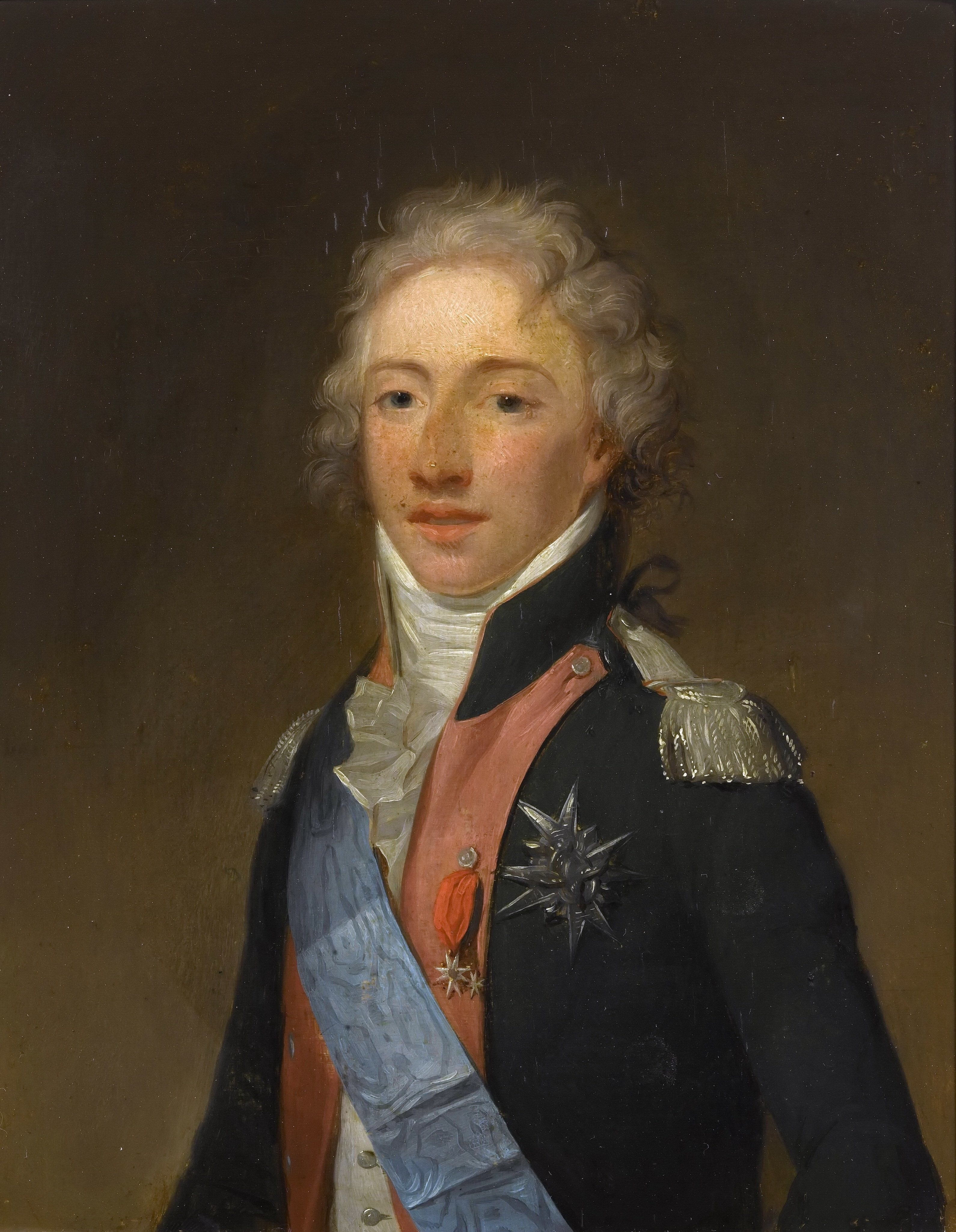 En uniforme de colonel-général du régiment "Angoulême-Dragons" pendant son exil à Edimbour en 1796, fils aîné du comte d'Artois (futur Charles X)